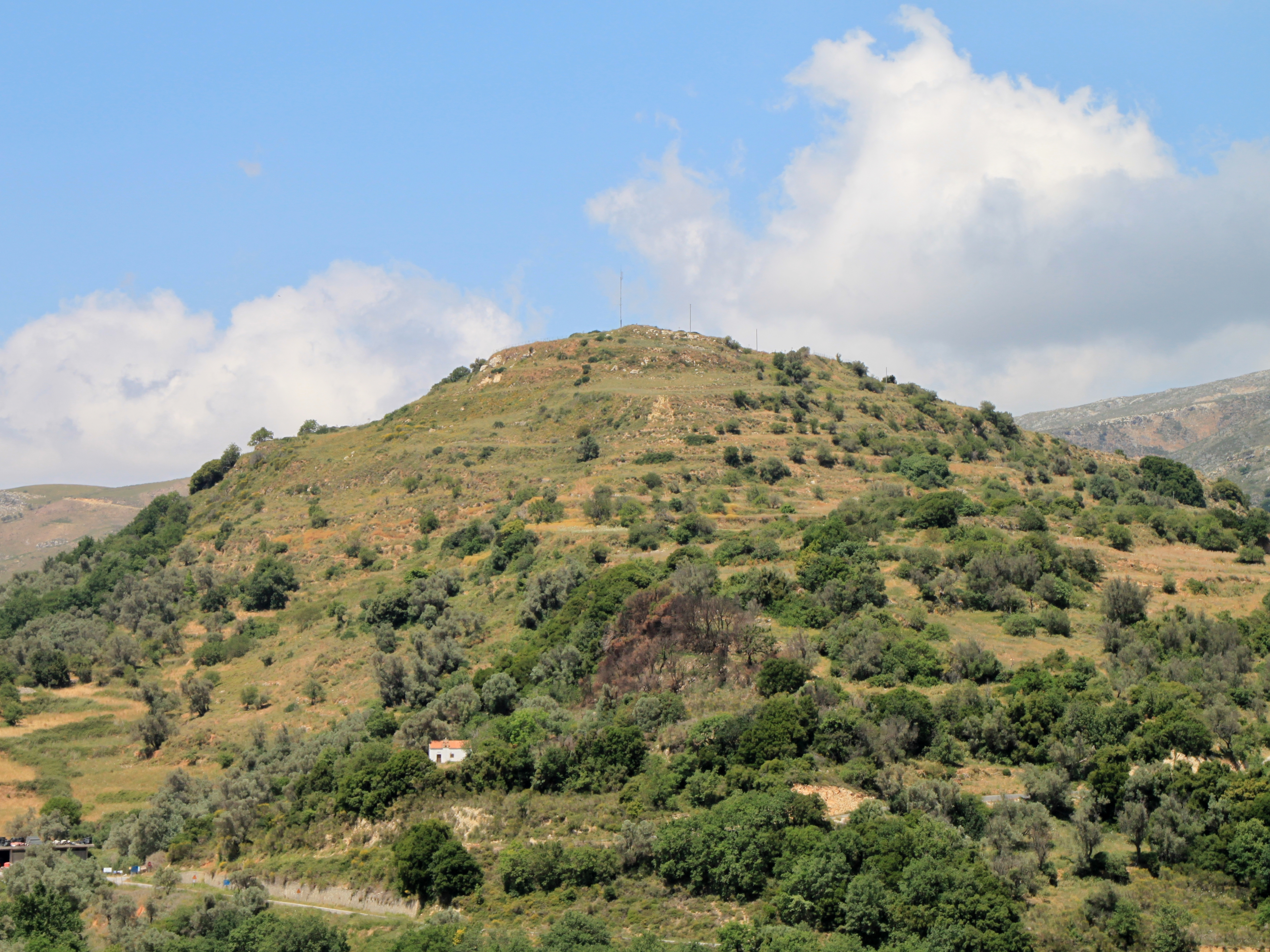 Hügel Kefala bei Thronos, Gemeinde Syvritos, Präfektur Rethymno, Kreta, Griechenland